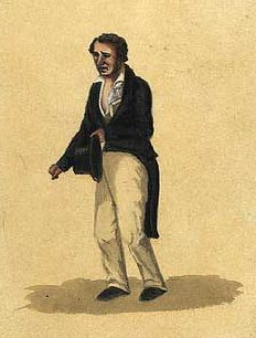 koloreret stik af Jens Peter Tønder (1773-1836)